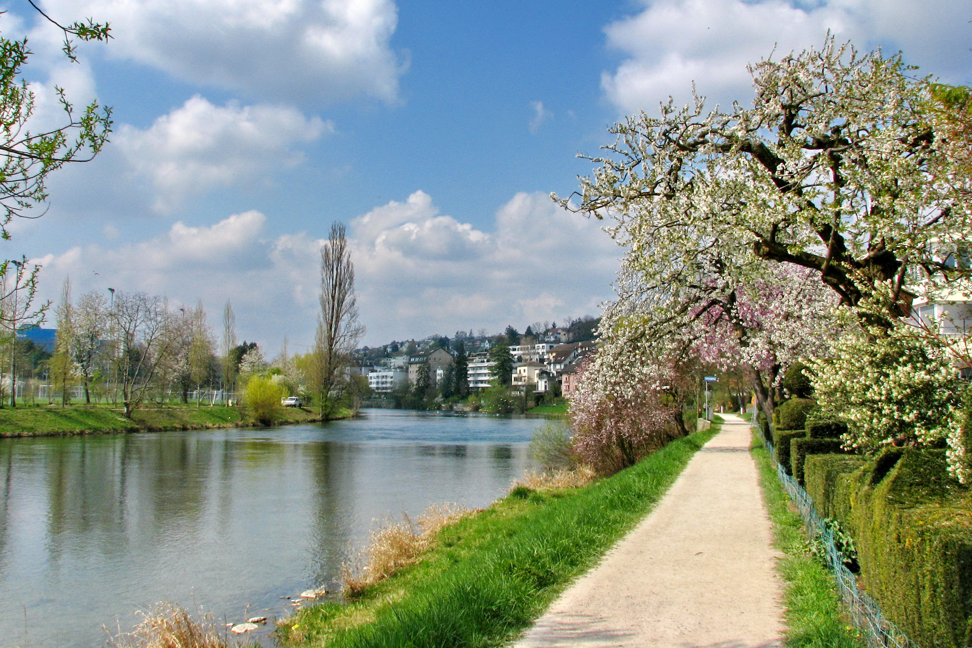 Limmat in Zürich-Höngg